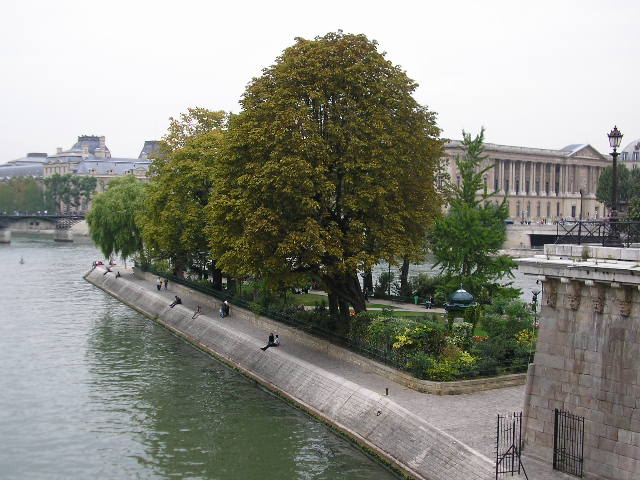 The square du Vert-Galant, on the île de la Cité, Paris, France